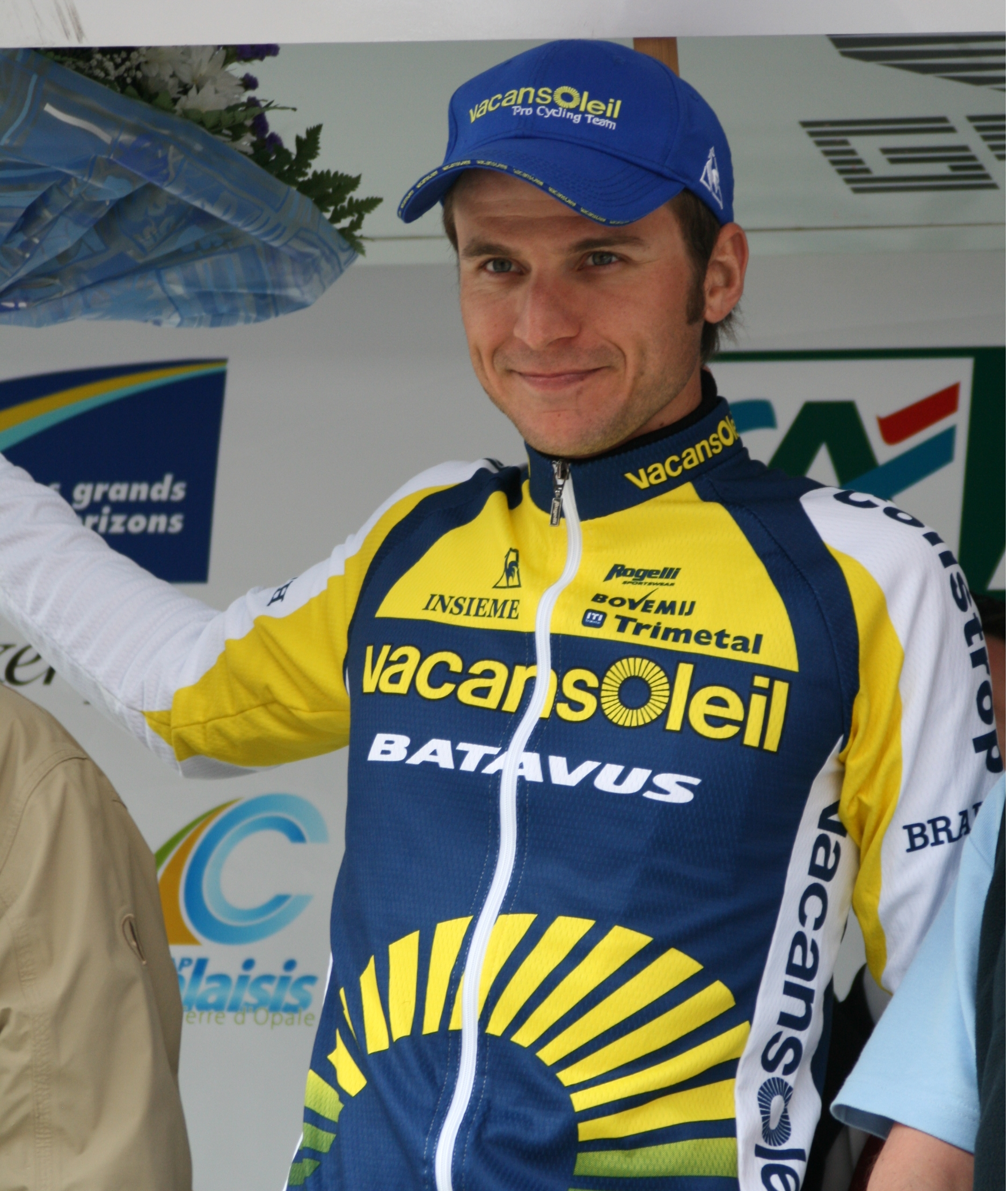 Martin Mortensen, sur le podium des Quatre jours de Dunkerque 2009